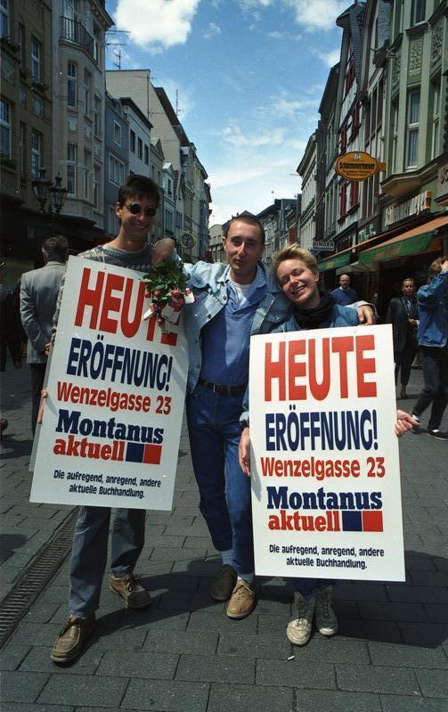 Juni 1988 Bonn, Neueröffnung von "Montanus" in der Wenzelgasse